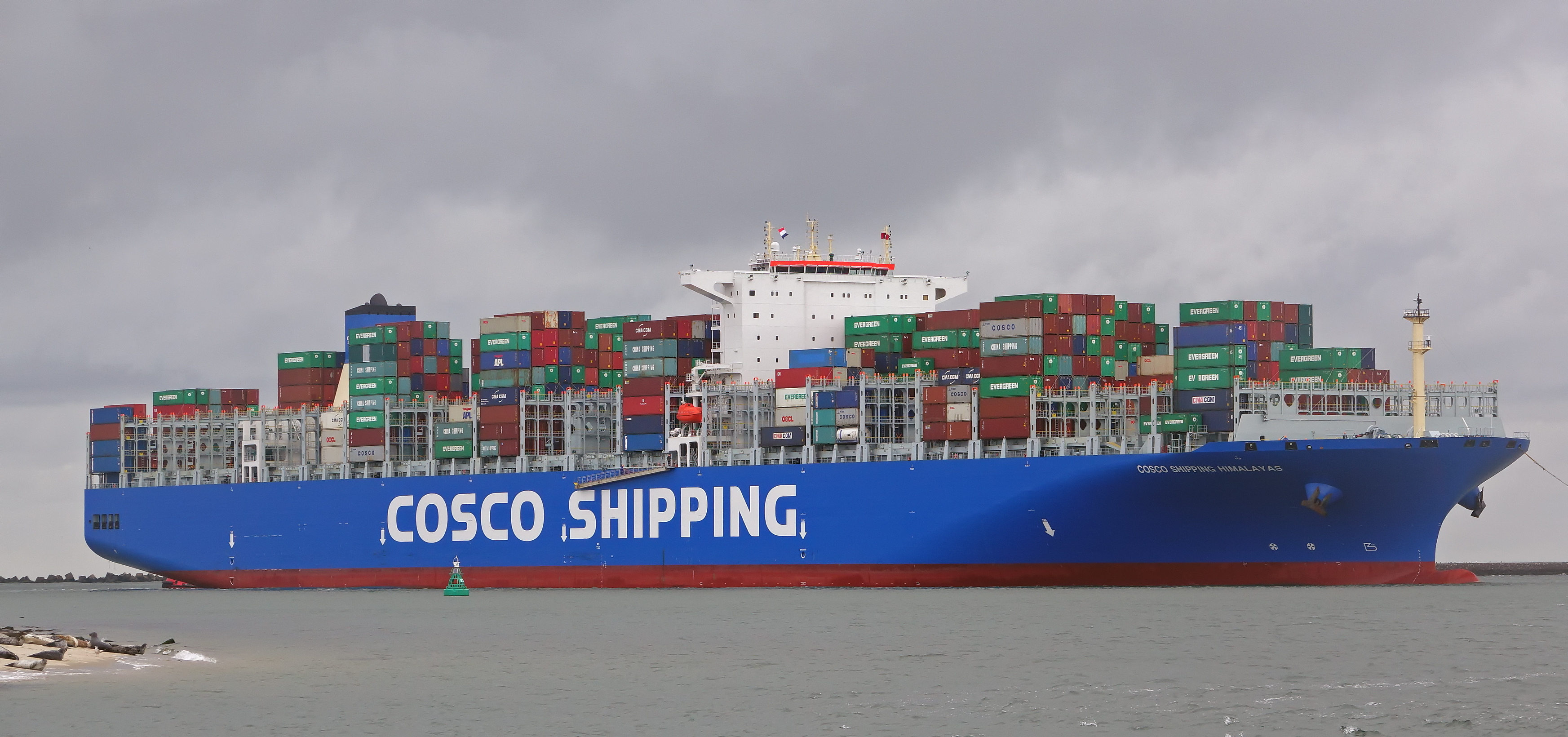 RT ADRIAAN en ROTTERDAM assisteerden het containerschip naar de Euromax terminal in de Yangtzehaven op Maasvlakte 1 , gezien vanaf de Fast Ferry DE NIEUWE PRINS van de RET.